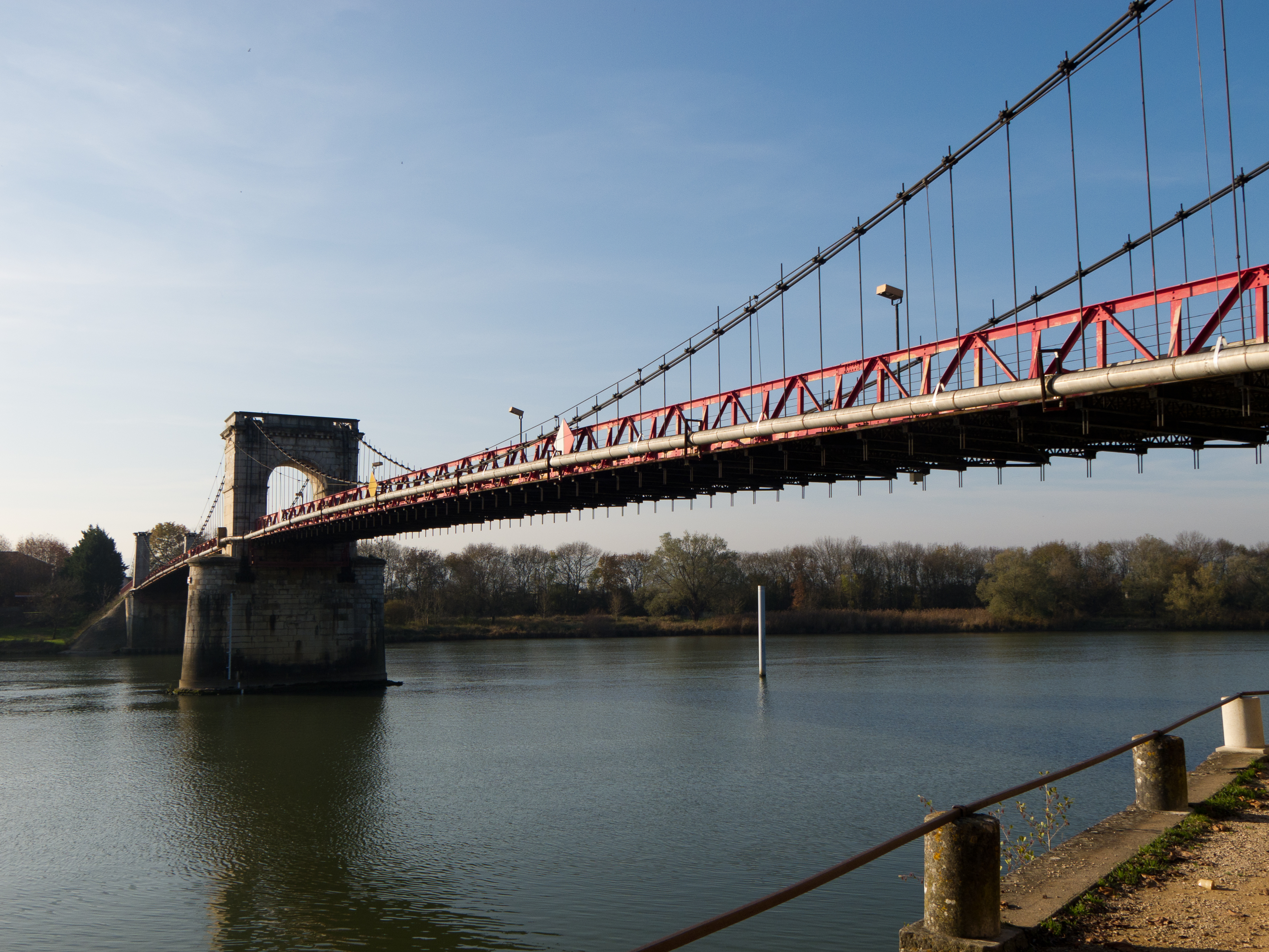 Pont suspendu de Beauregard - Villefranche-sur-Saone - Beauregard - Ain - France